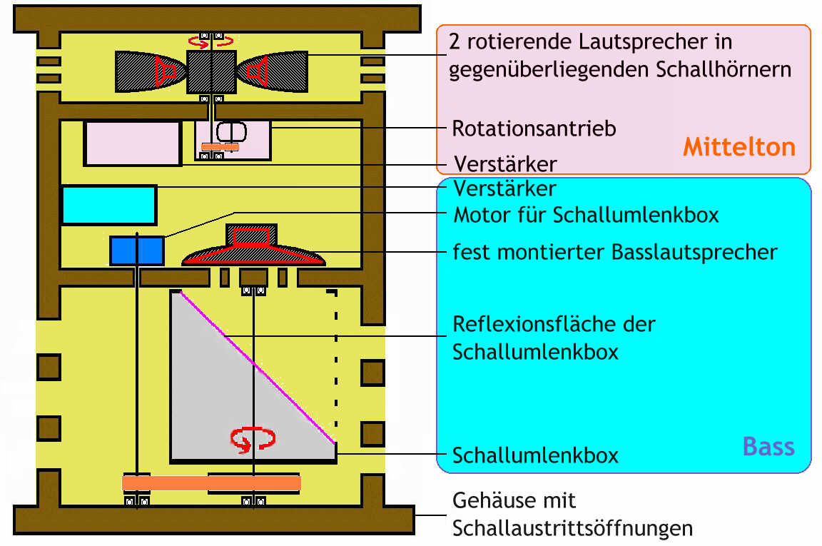 functionsprinzip Lesliebox